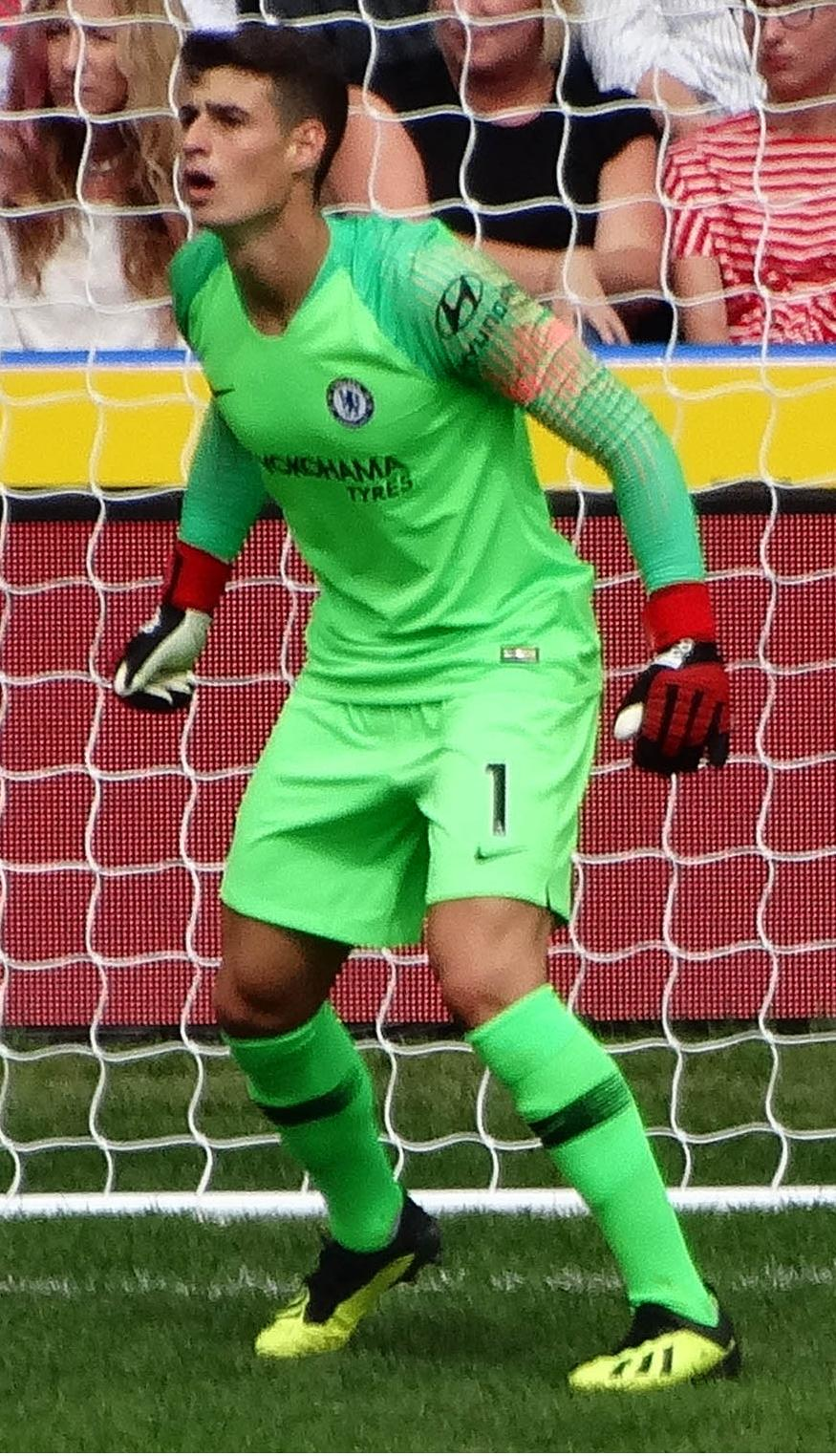 Kepa Arrizabalaga playing for Chelsea